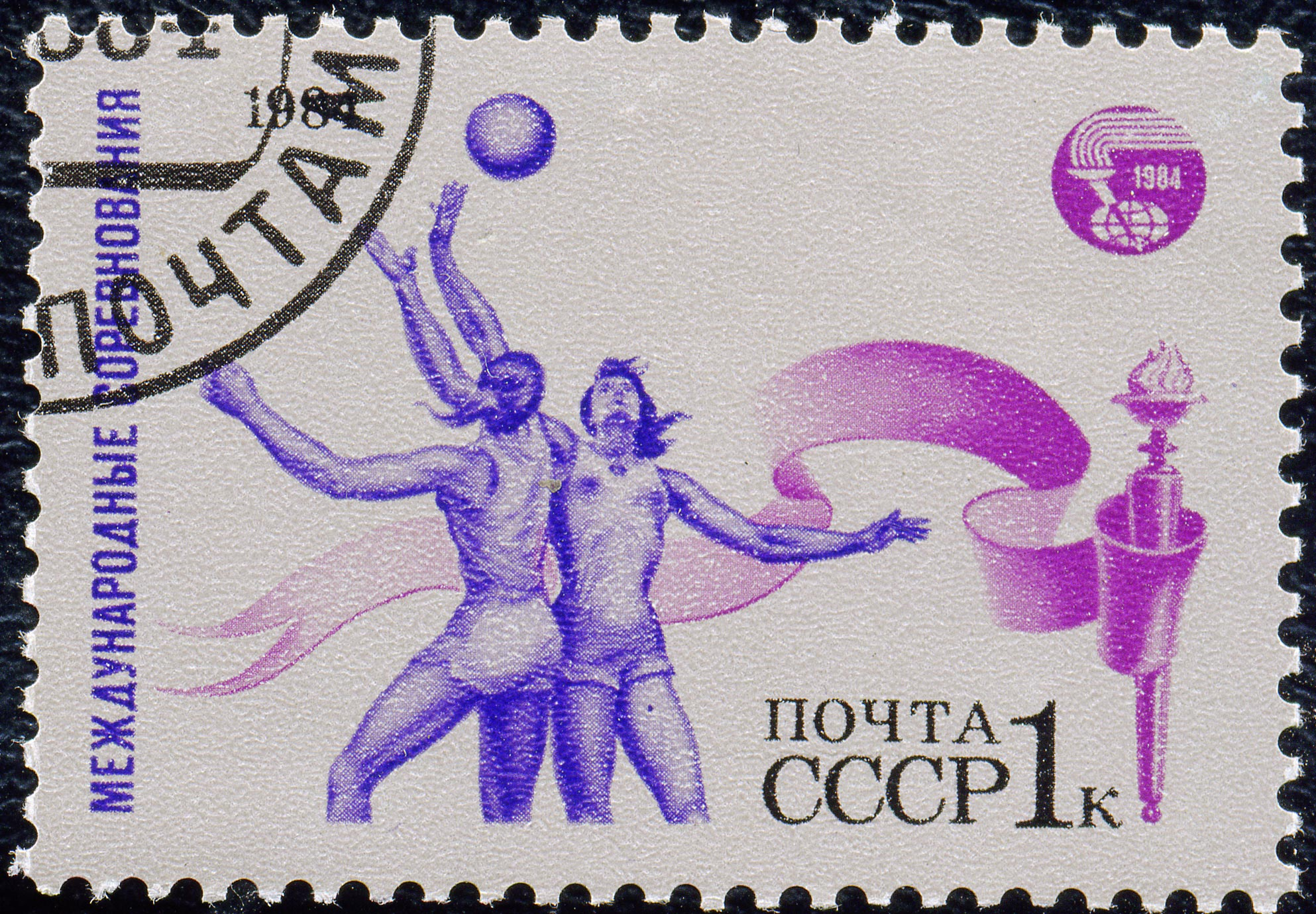 Почтовая марка СССР. 1984. Международные соревнования «Дружба-84». Волейбол